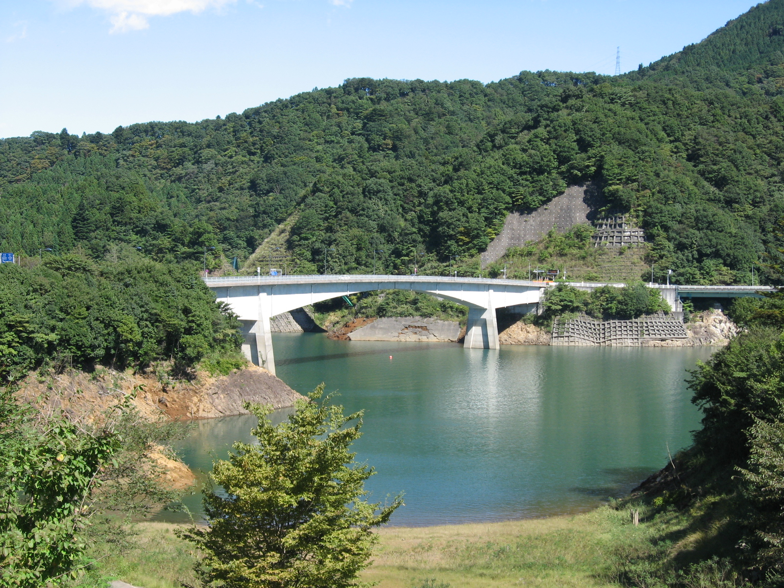 宮の平地区から望むやまびこ大橋